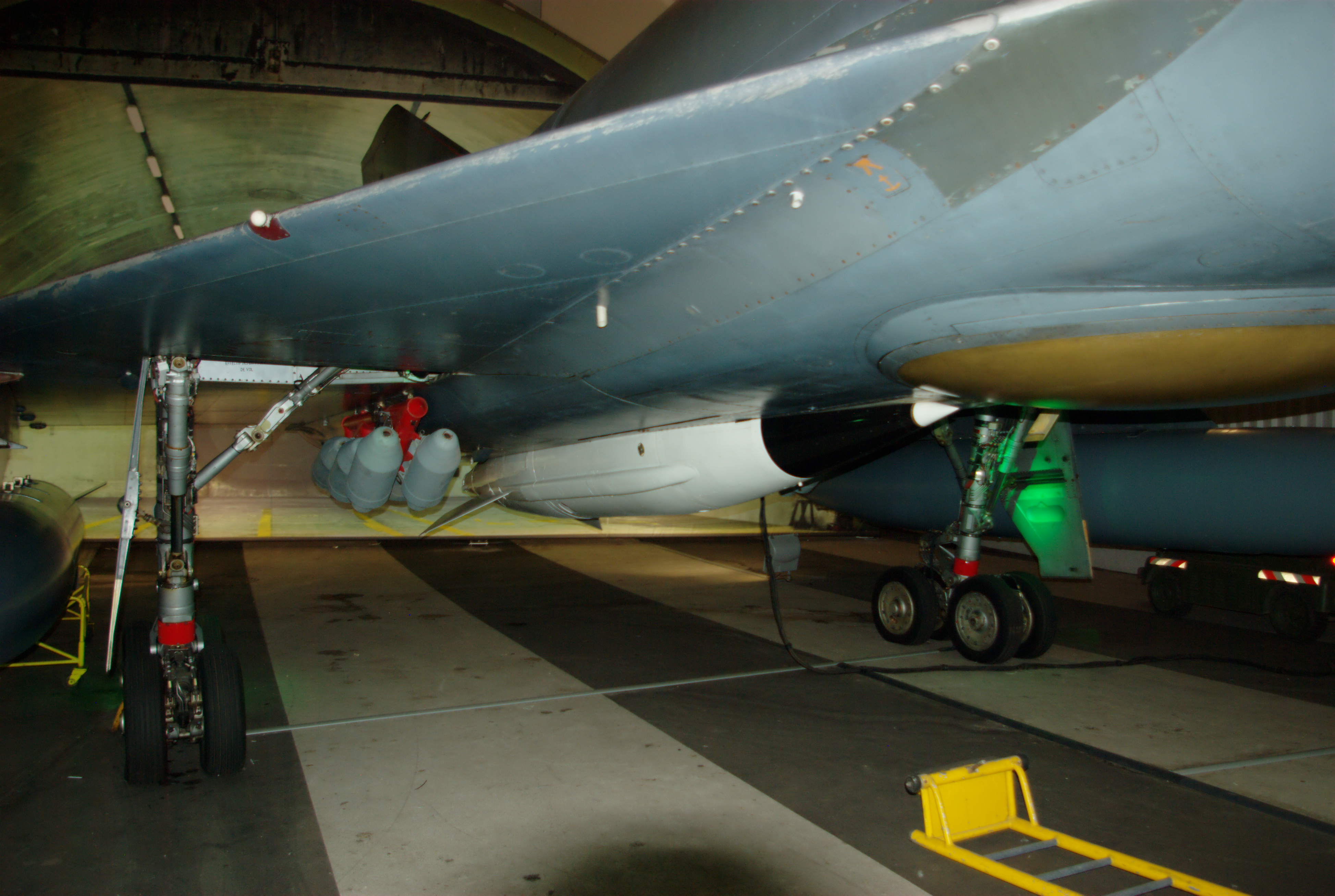 Mirage IV équipé d'une bombe nucléaire AN-22 présenté au musée de l'Air et de l'Espace.